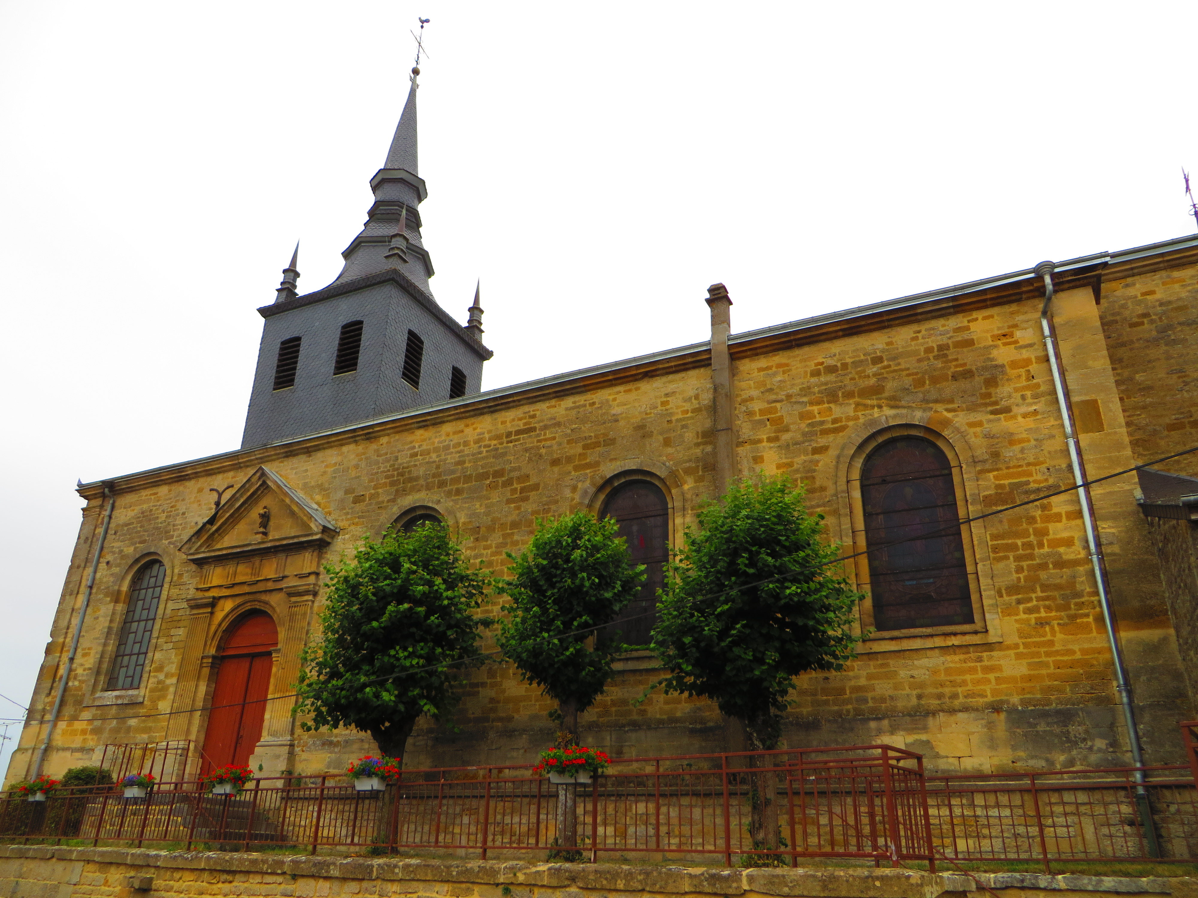 Remoiville L'église Saint-Jacques